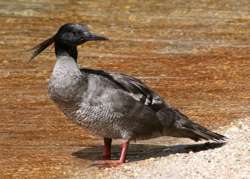 Exemplar macho de Pato-Mergulhão (Mergus octosetaceus), ave criticamente em perigo de extinção, em São Roque de Minas, Minas Gerais, Brasil.